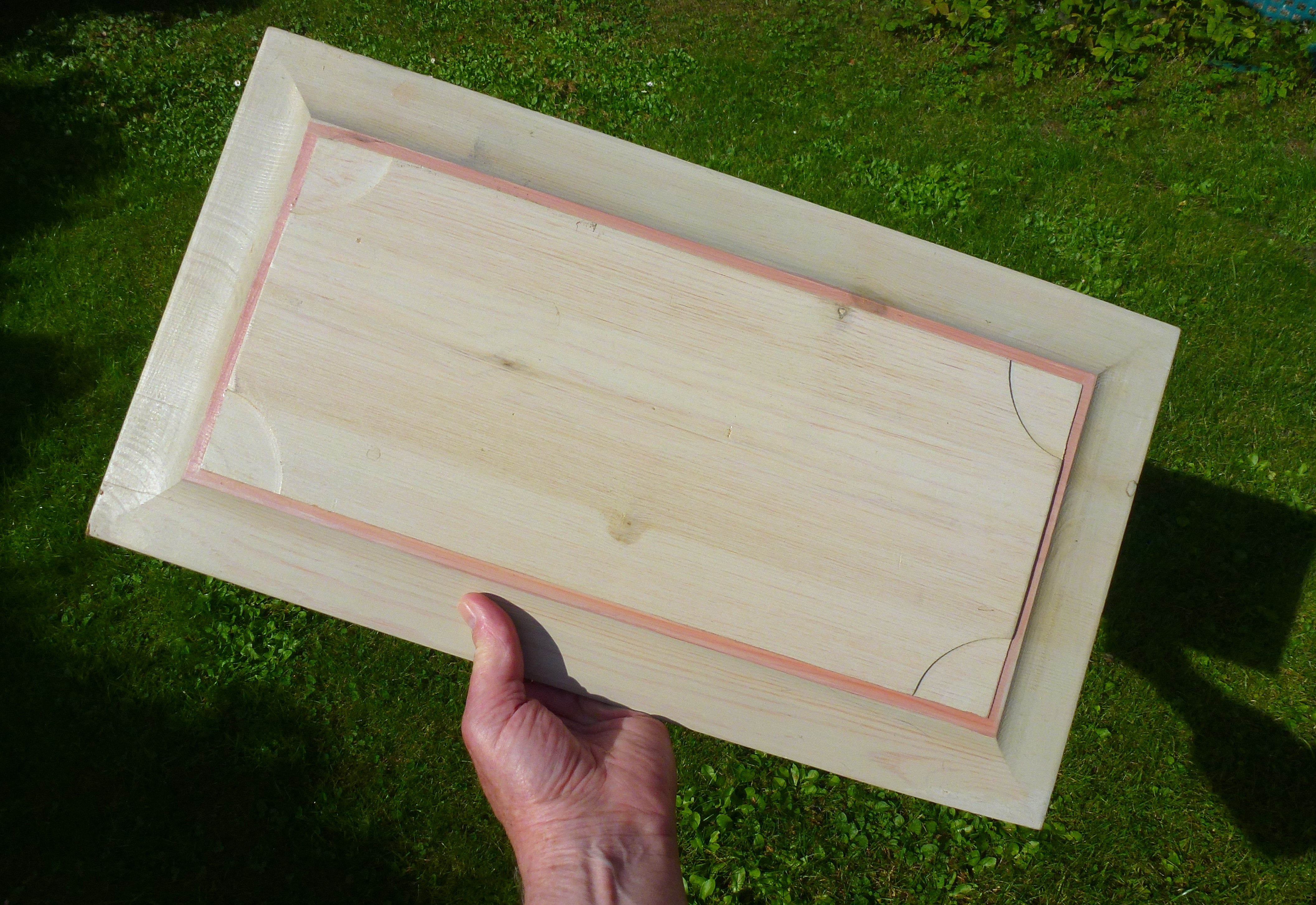 Lös dörrspegel